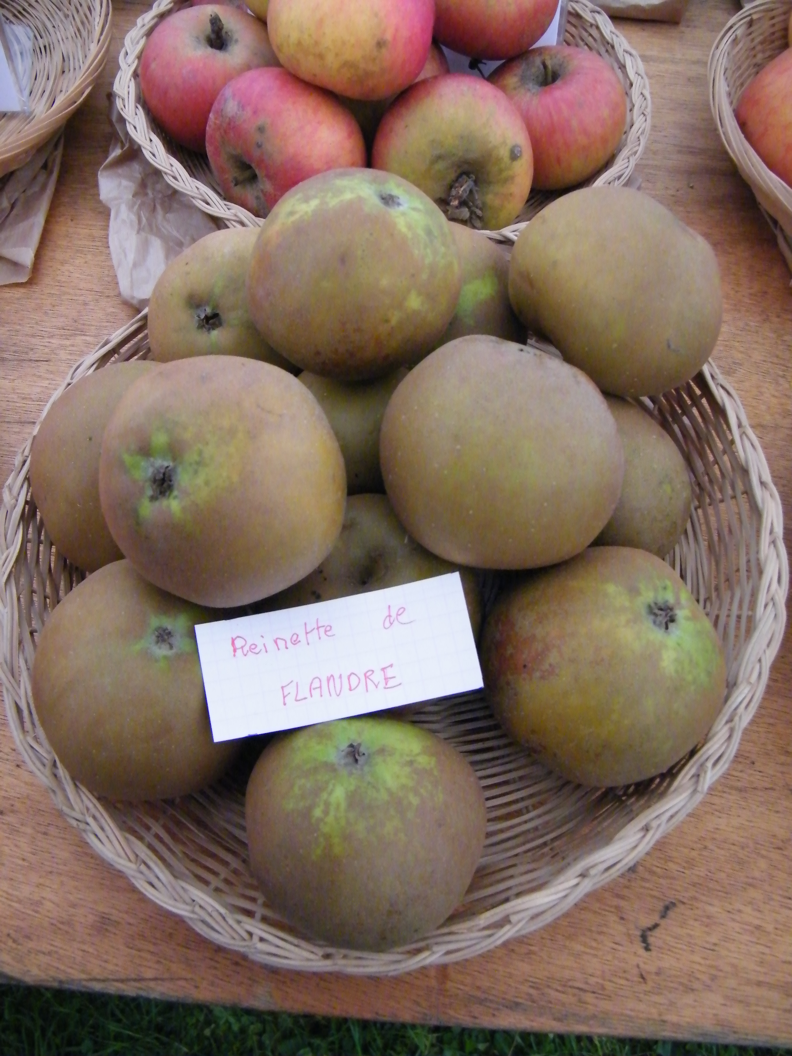 Reinette de Flandre, Mons-Boubert, Somme, Fr, exposition du 29-10-2017 (110).